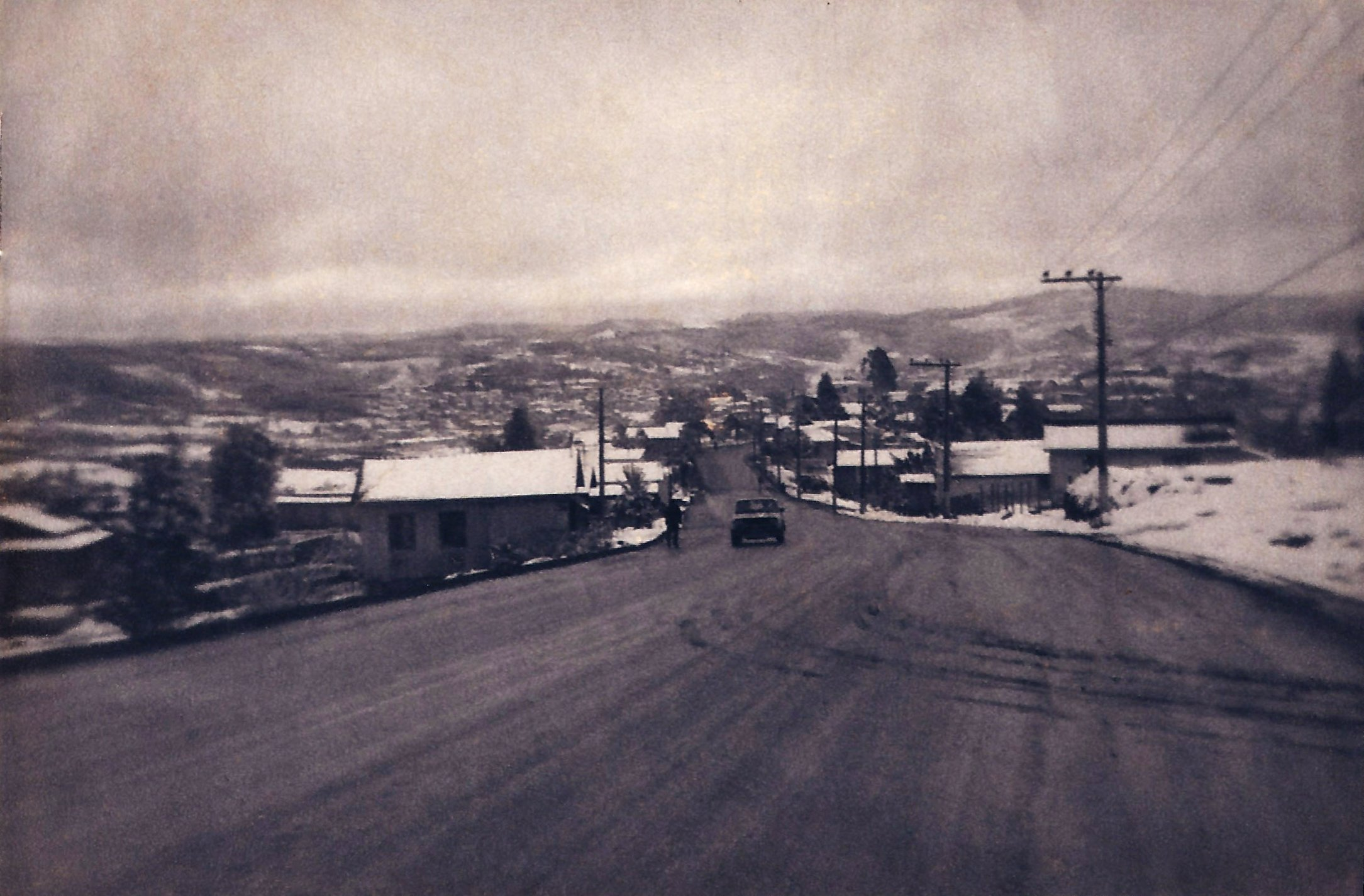 Queda de neve em Caçador, registrada do alto da Rua Brasília em 19 de agosto de 1981.